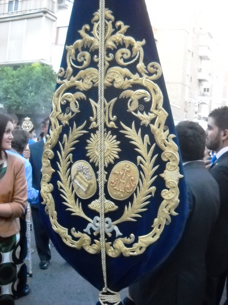 Escudo que aparece en el bacalao de la hermandad